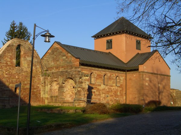 Hornbach (Pfalz), Fabianstift